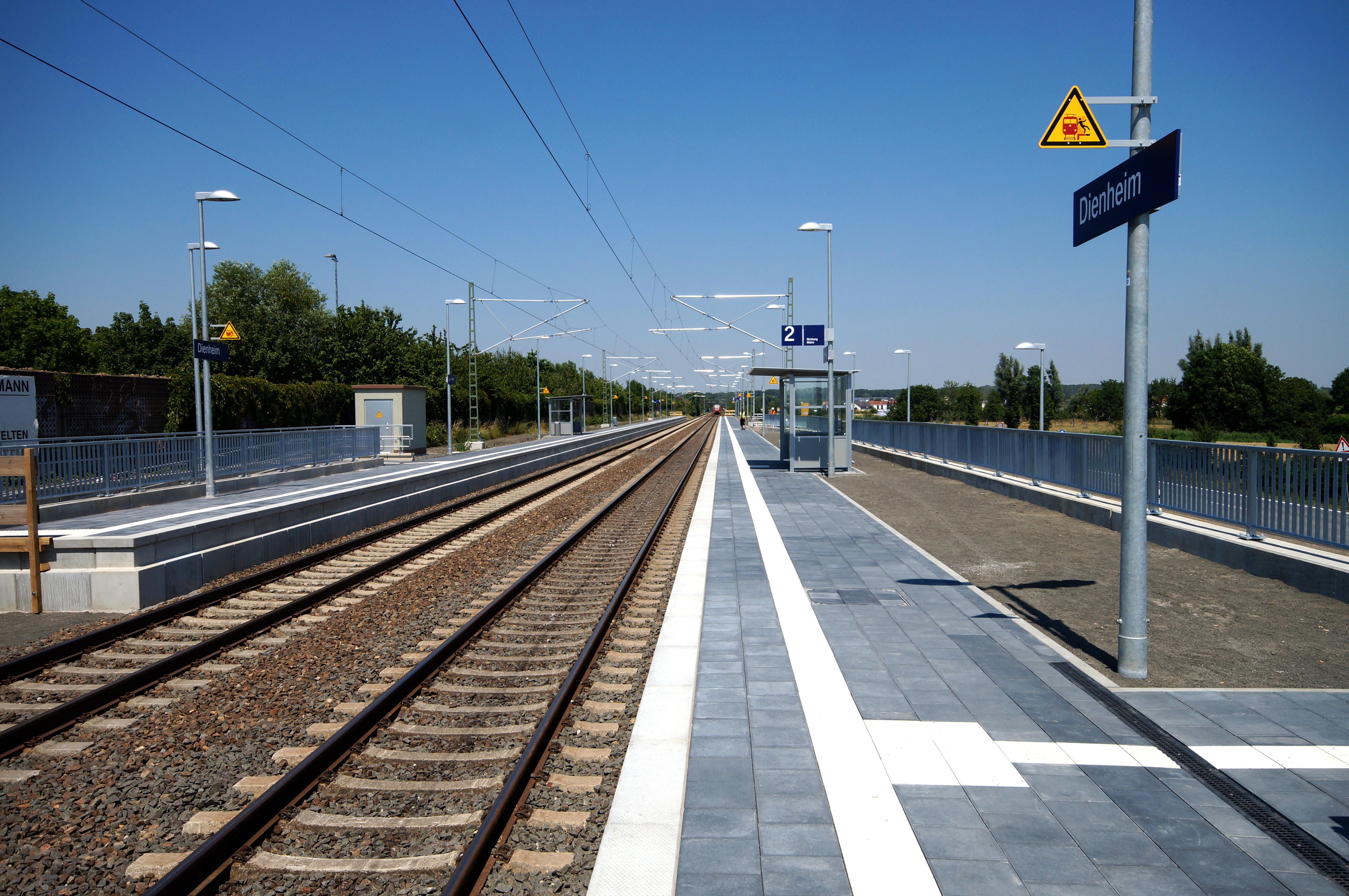 Der Dienheimer Haltepunkt auf der Bahnstrecke Mainz–Ludwigshafen, der zum Fahrplanwechsel am 14. Juni 2015 um 00:00 Uhr in Betrieb genommen wurde